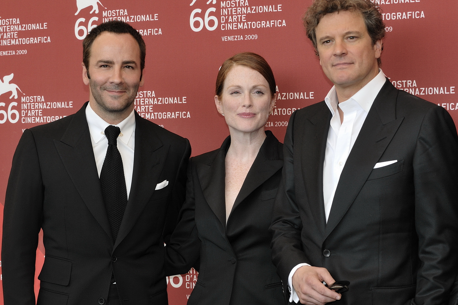 66ème Festival du Cinéma de Venise (Mostra), 10ème jour (11/09/2009) Photocall avec Colin Firth, Julianne Moore, Matthew Goode et le réalisateur Tom Ford pour le film : A single man